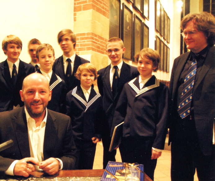 Robert Schneider bei einer Lesung in der Thomaskirche in Leipzig 2008